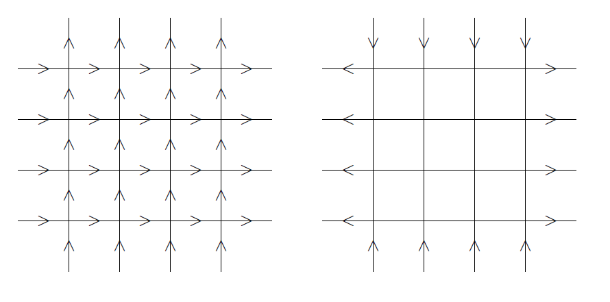 Conditions aux bords du modèle à six vertex